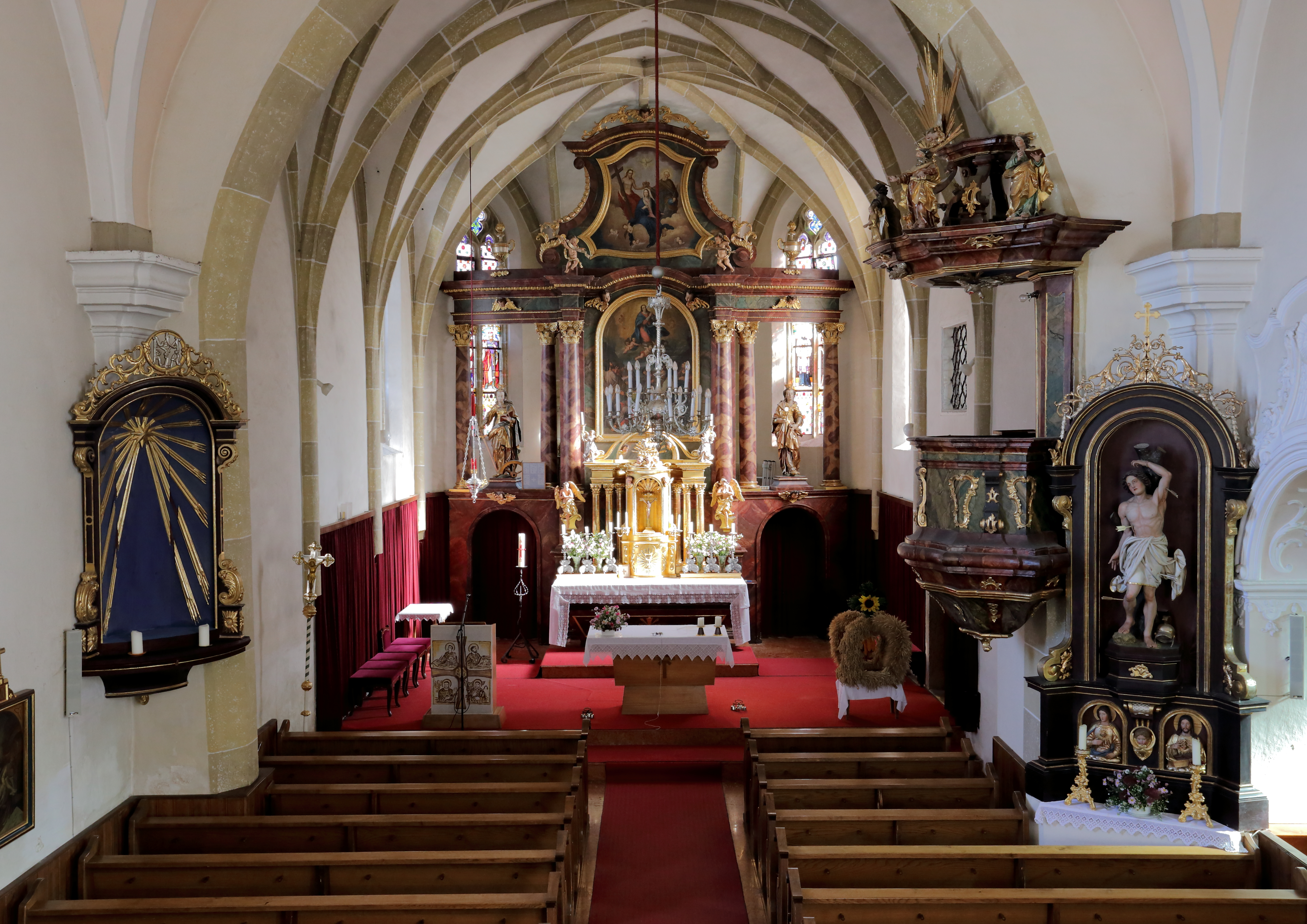 Innenansicht der katholischen Pfarrkirche Mariä Himmelfahrt der oberösterreichischen Gemeinde Weilbach.Der Hochaltar wurde lt. Inschrift 1845 gefertigt und ist in spätbarocker-klassizistischen Tradition ausgeführt. Die Rokoko-Kanzel ist ein Werk aus dem Jahr 1768.